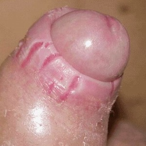 Крайняя плоть полового члена, повреждённая в результате растяжения крайней плоти, подвергшейся изменениям, связанным с фимозом